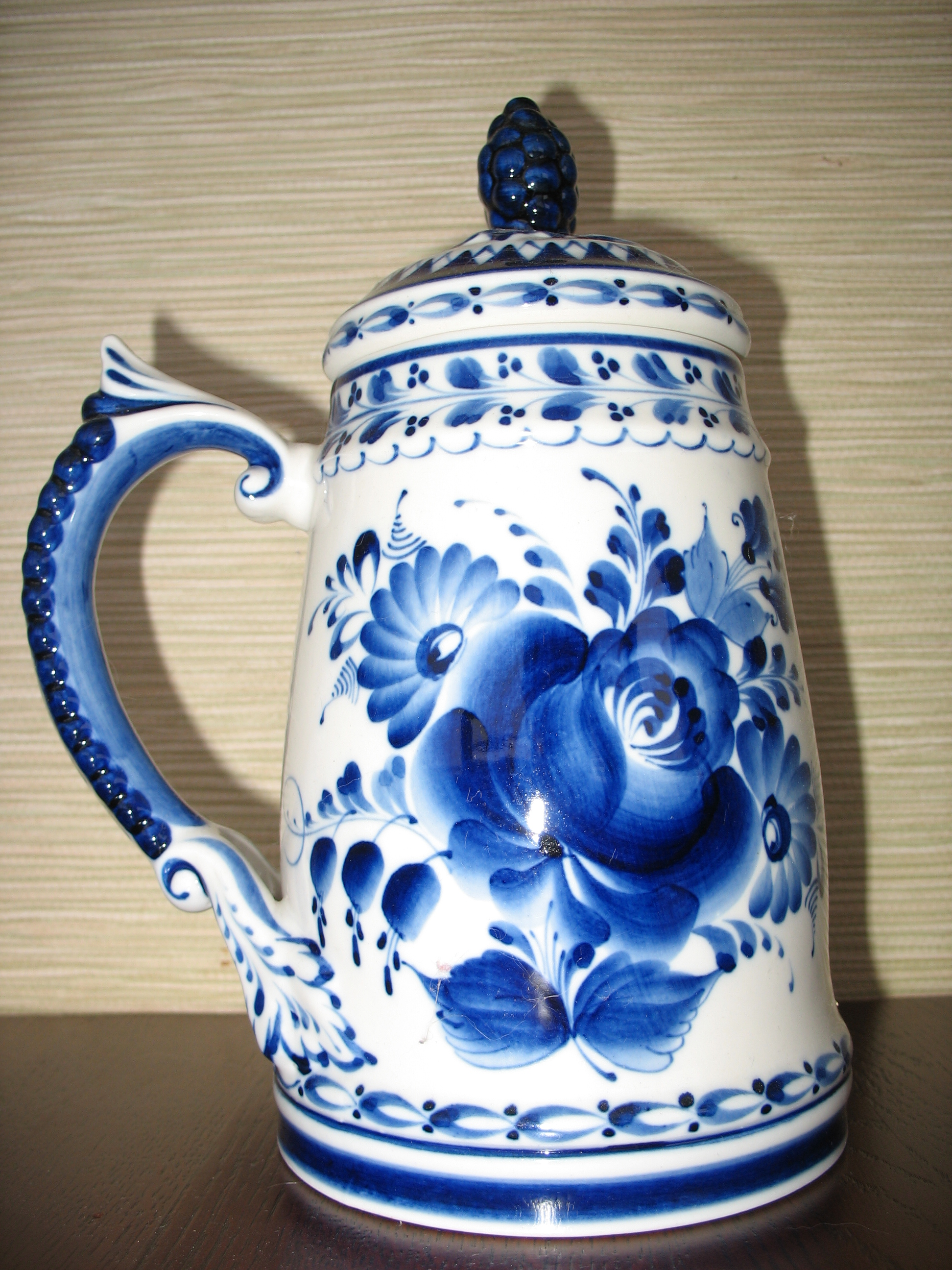 Кувшин гжель